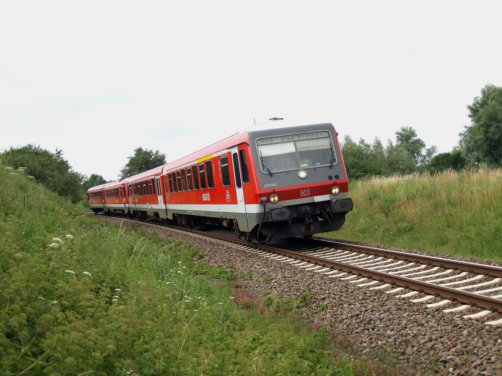 Baureihe 628 auf der Bahnstrecke Lübeck-Bad Kleinen bei Bobitz